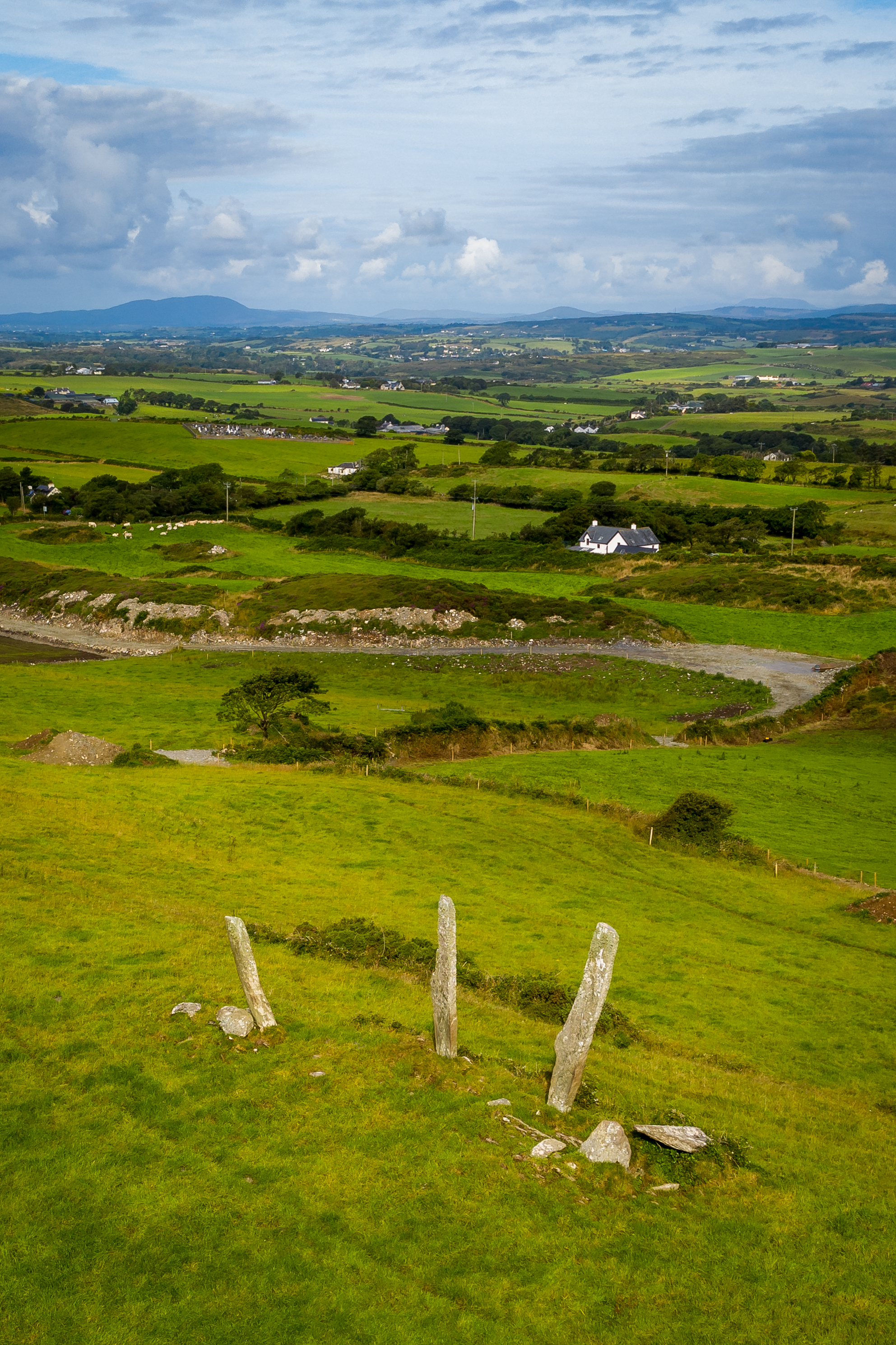 Steinreihe von Gurranes